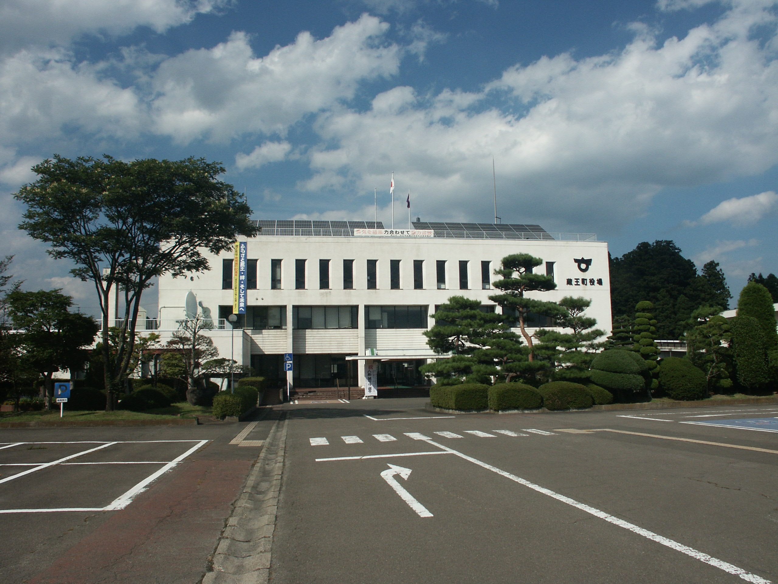 蔵王町役場庁舎